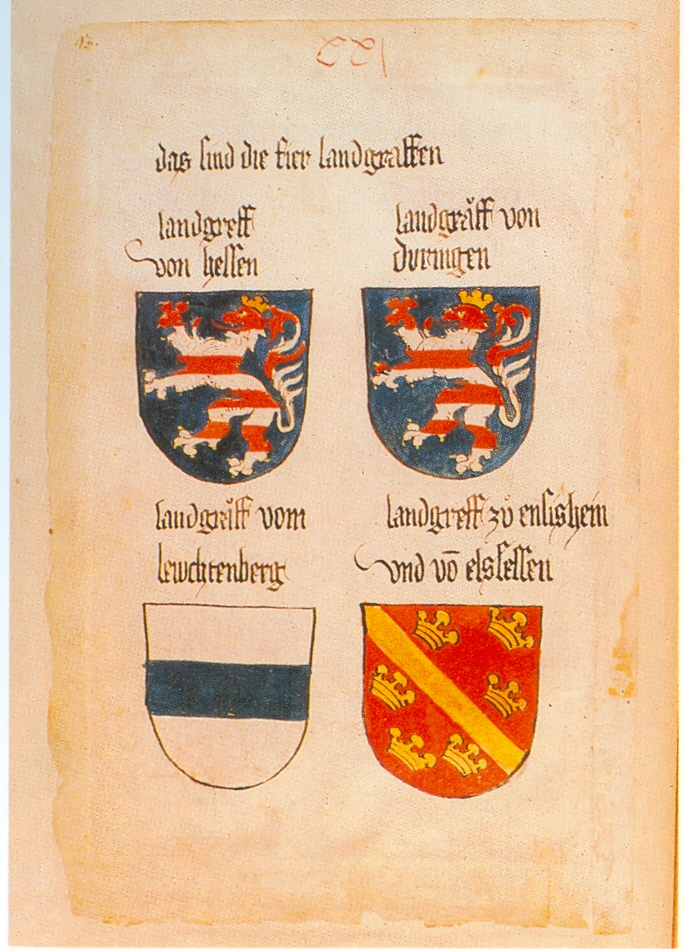 Ingeram-Codex der ehemaligen Bibliothek Cotta XXj das sind die fier landgraffen landgreff/von hessen landgräff von/duringen landgräff vom/lewchtenberg landgreff zu ensishein und vo(n) elssessen